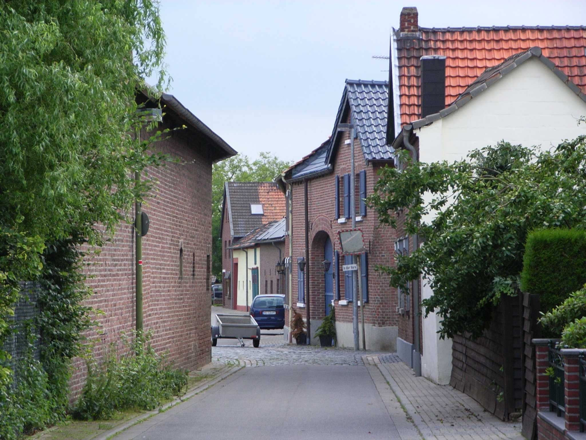 Erkelenz Houverath